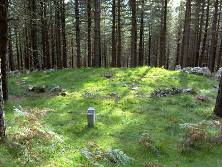 Cromlech mayor de Etzelako Arritxuriak, en la estación prehistórica Onyi-Mandoegi (Gipuzkoa).